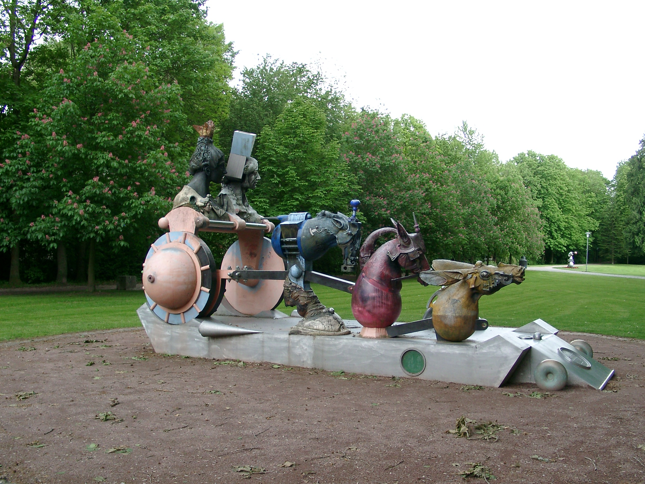 Angelbachtal, Ortsteil Eichtersheim, Skulptur im Garten des Schlosses Eichtersheim